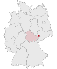 Landkreis Altenburger Land, Thuringia, Germany